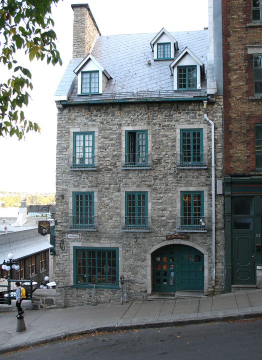 Maison Gervais-Beaudoin (ou Garon ou Gervais-Baudoin), Ville de Québec, Québec, Canada. 54, côte de la Montagne, à l'angle de l'escalier du Casse-Cou, résidence urbaine en pierre érigée avant 1741 et restaurée en 1966.